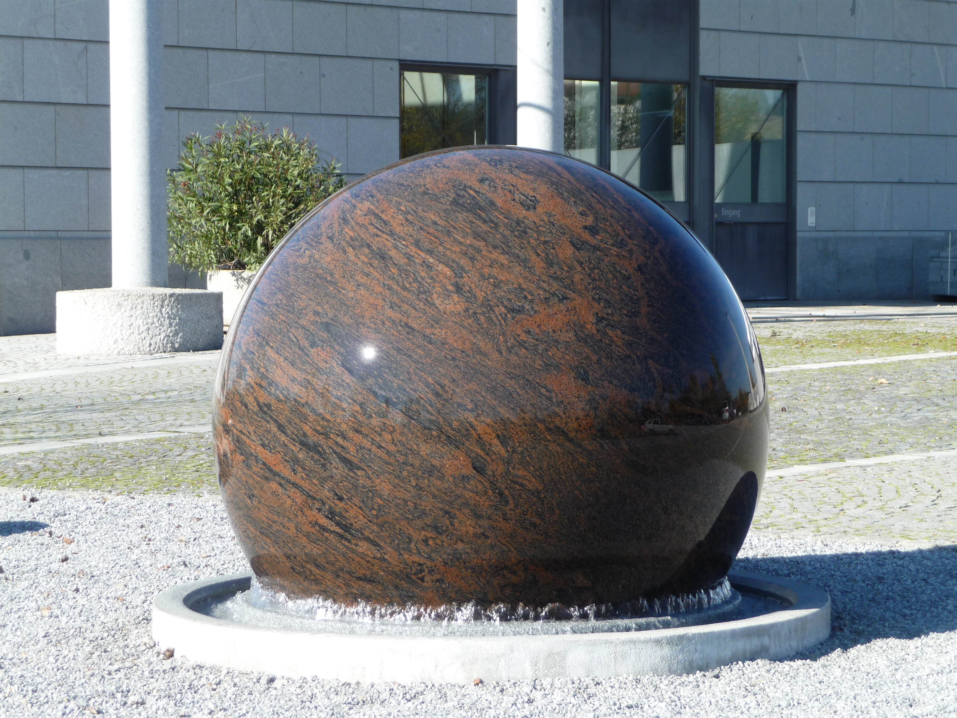 Der Kugelbrunnen mit schwimmender Steinkugel vor dem Firmengebäude der Kusser Granitwerke in Aicha vorm Wald